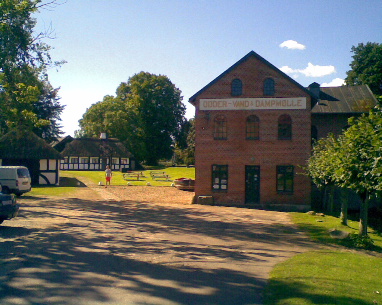 Odder Museum, Danmark